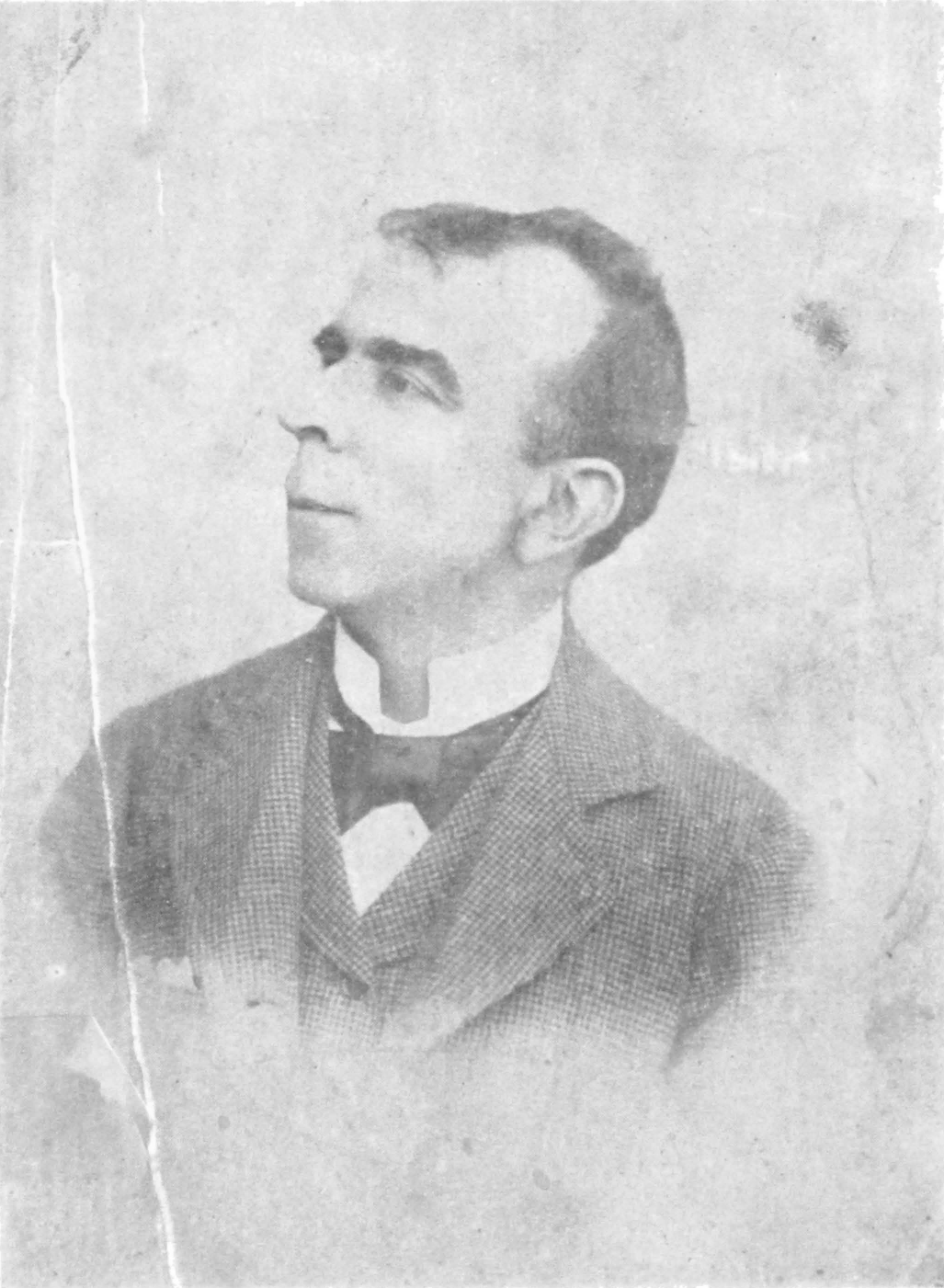 Fotografía de Eduardo Carmona y Vigones (1850, Jerez de la Frontera - 19??, posiblemente Montevideo), actor de teatro, poeta y dramaturgo uruguayo de orígen español.